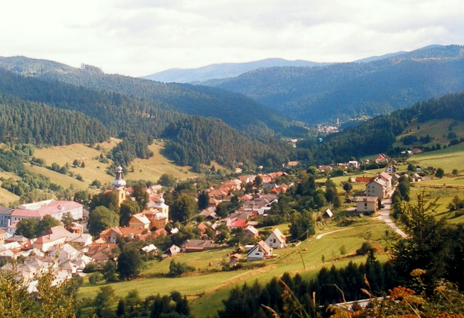 Obec Smolník okres Gelnica, rok 1998.